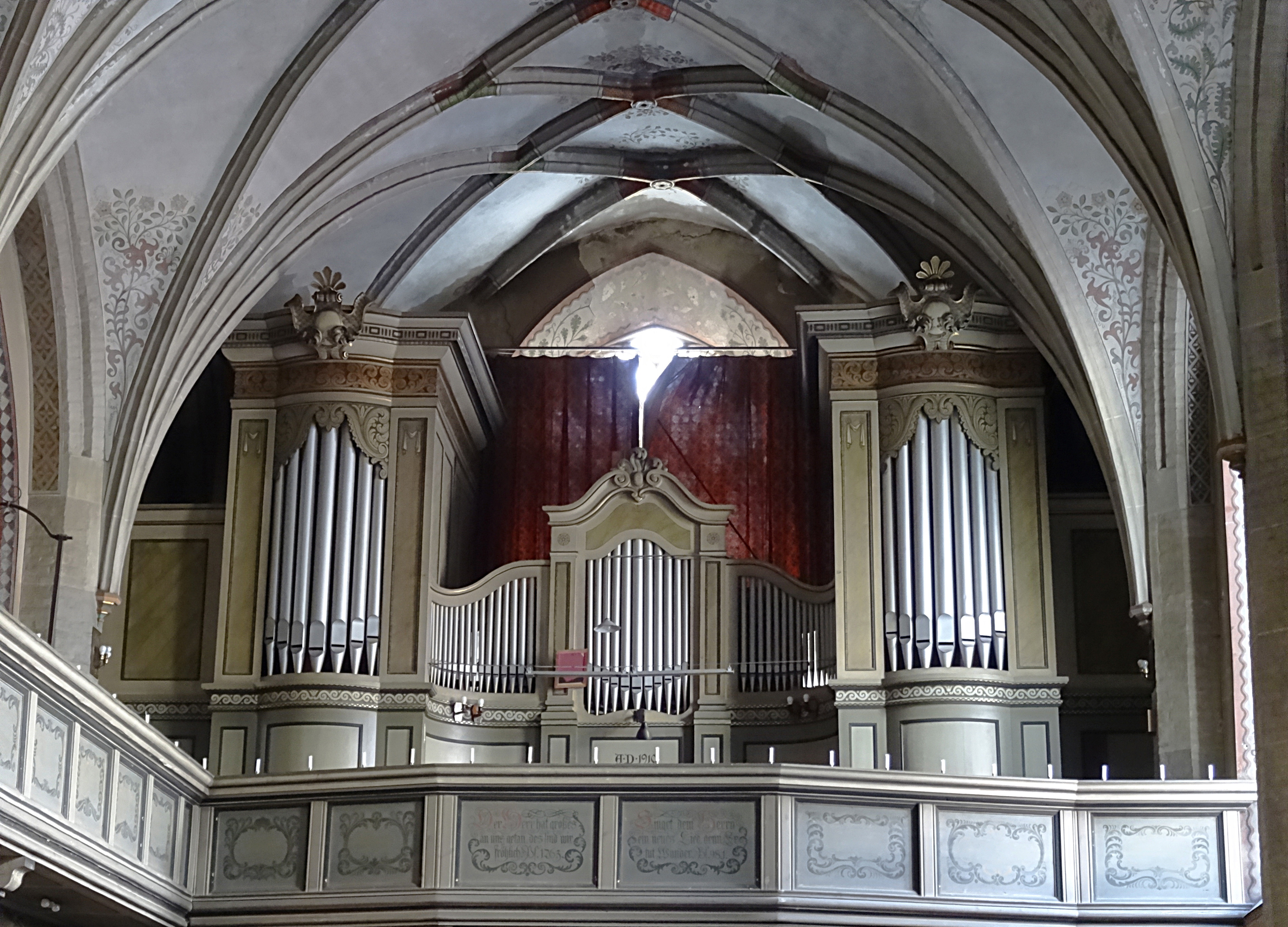 Orgel in der Dreifaltigkeitskirche (Görlitz) von Eule Orgelbau (1955) im alten Gehäuse von Julius Röhle (1910) mit Teilen von Ladegast (1873) [1]